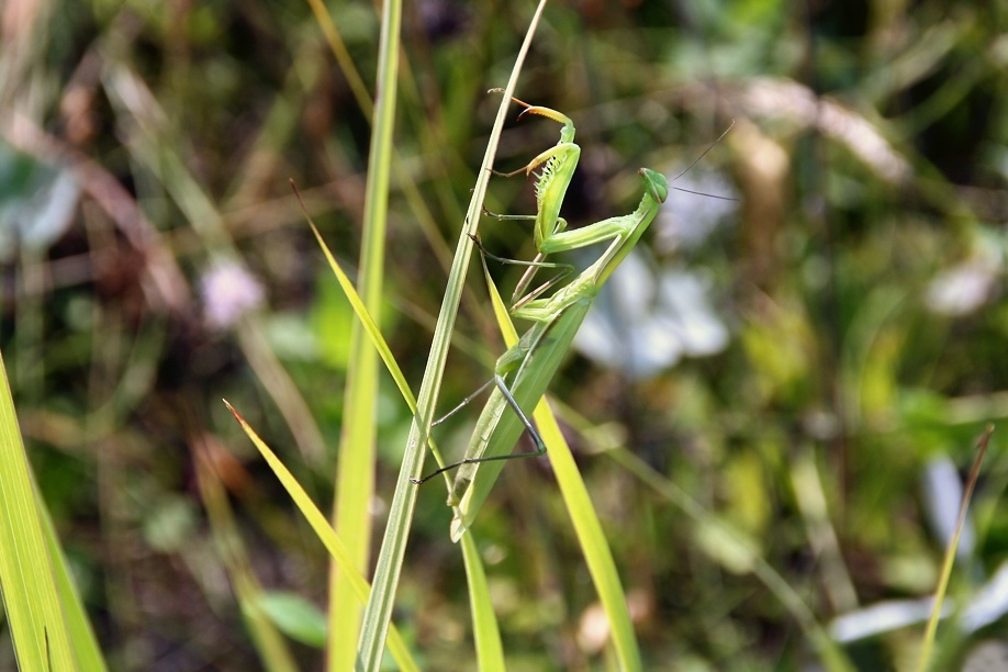 Богомол, Жигулёвские горы, Россия